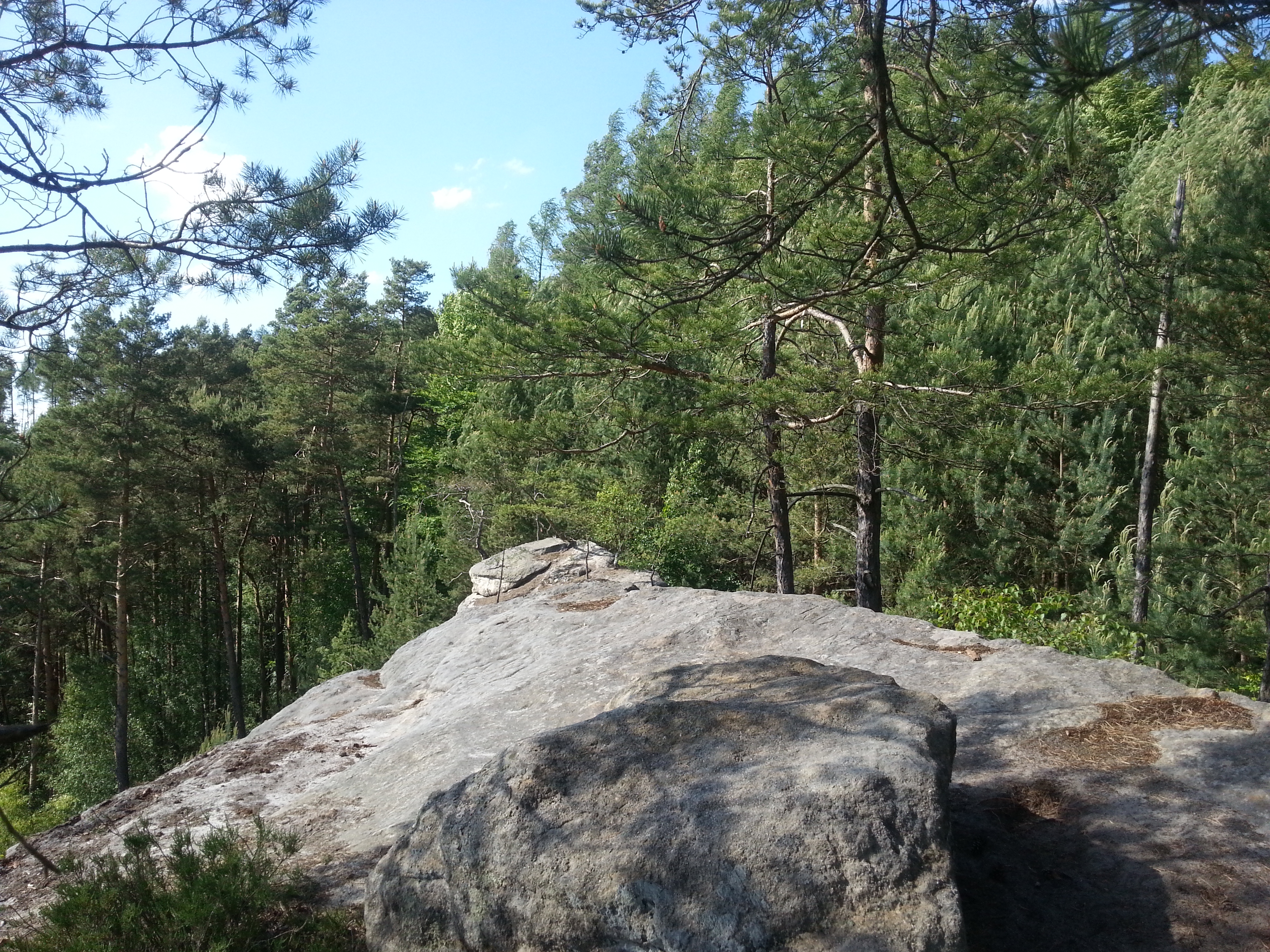 Místo vyhlídky.